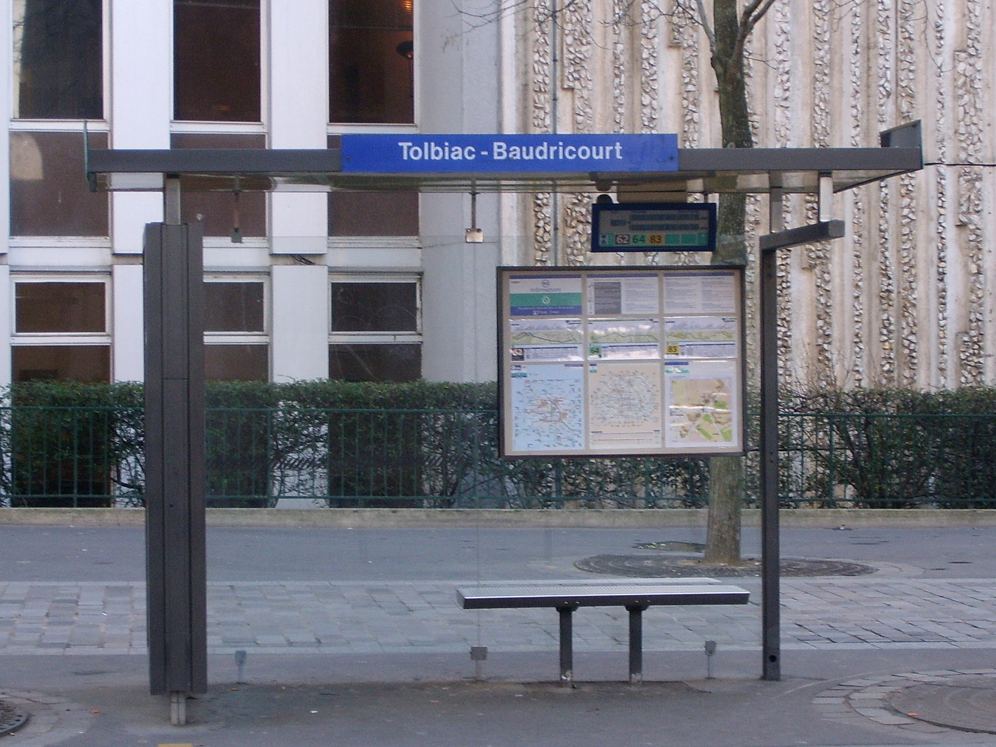 Arrêt de bus Tolbiac-Beaudricourt - 75013 Paris - France